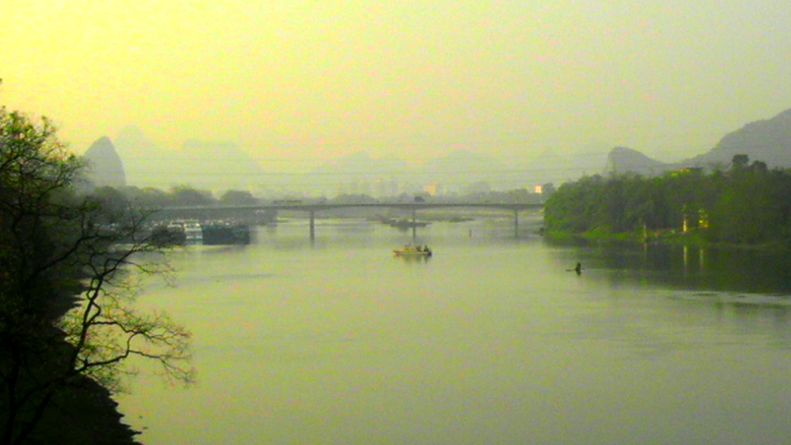 净瓶山大桥